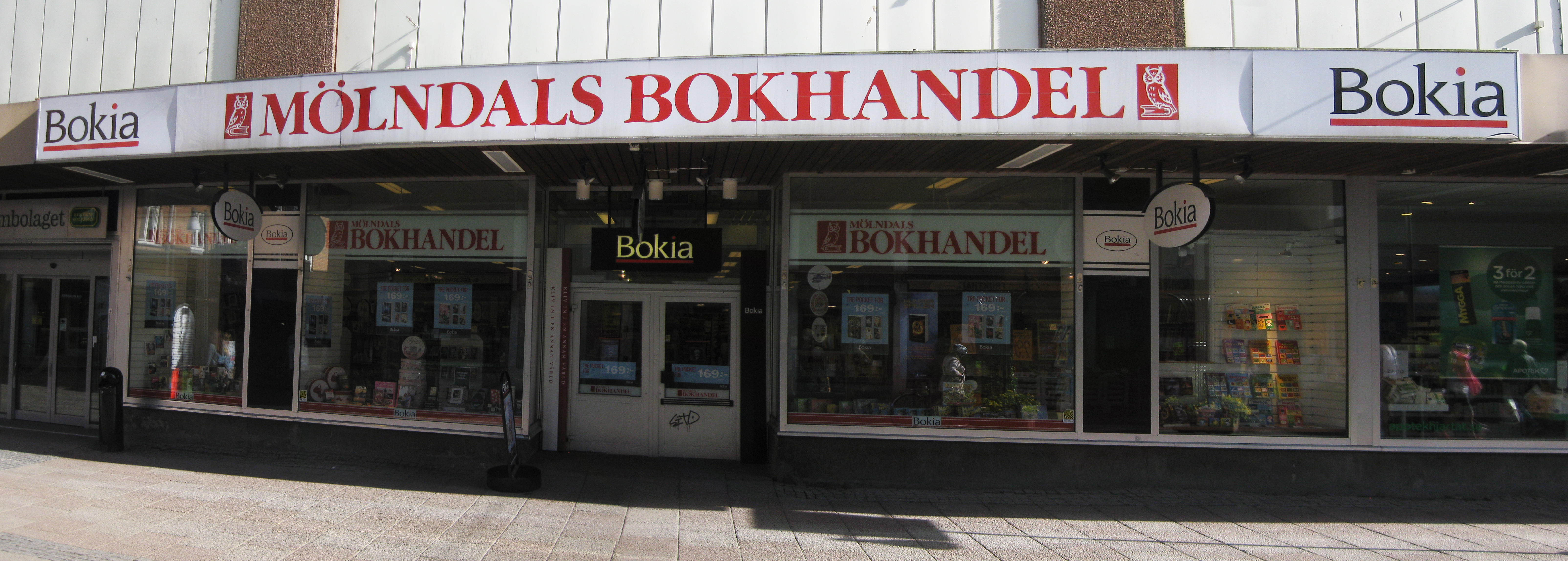 Bokia i Mölndal, Mölndals bokhandel.